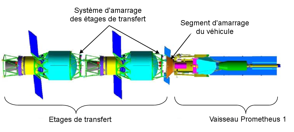 Prometheus 1 replié et amarré à ses étages de transfert